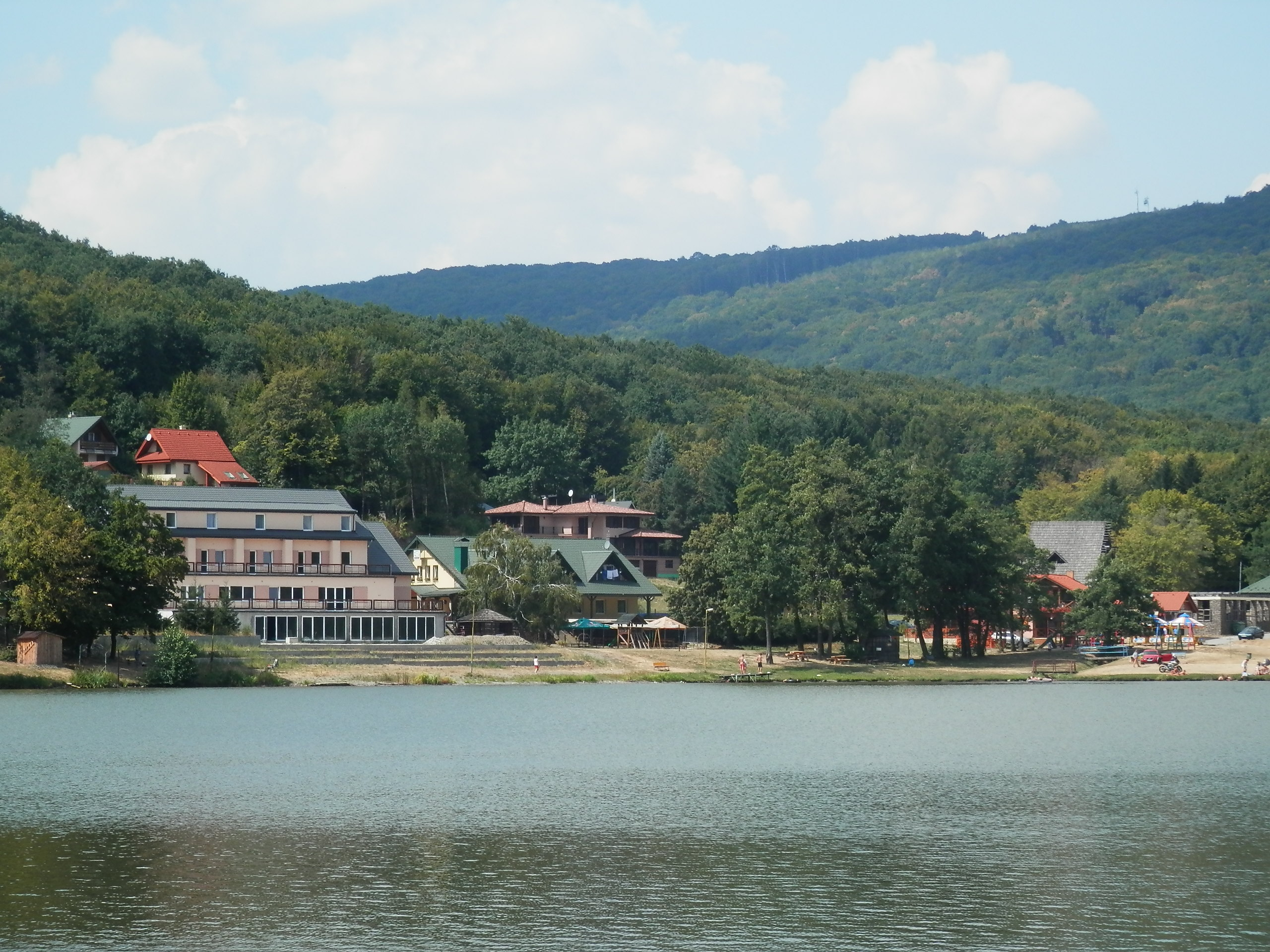 jazero nad obcou Vinné, okres Michalovce.